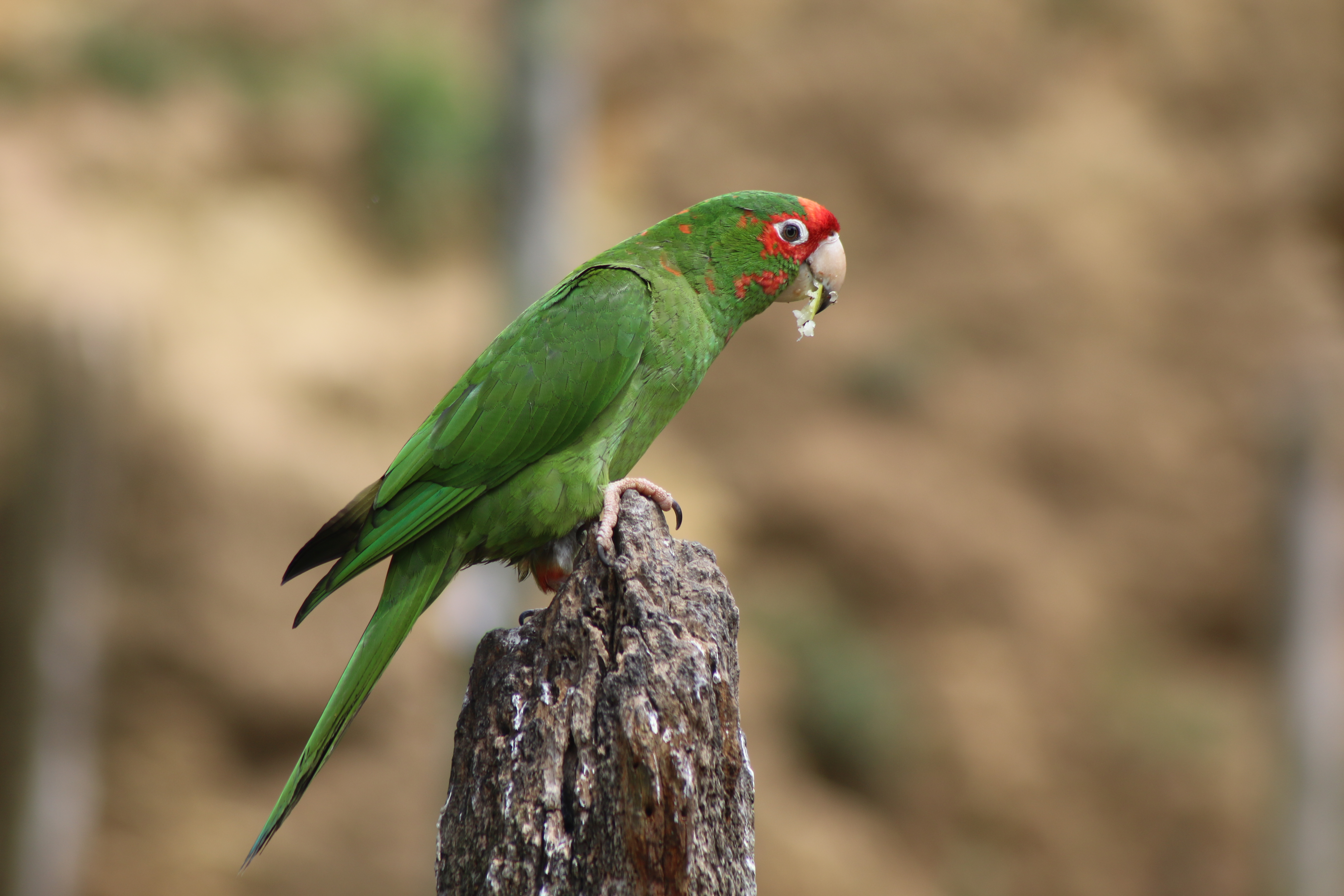 Conure mitrée (Psittacara mitrata), Bioparc de Doué-la-Fontaine (France), Grande volière Sud-Américaine